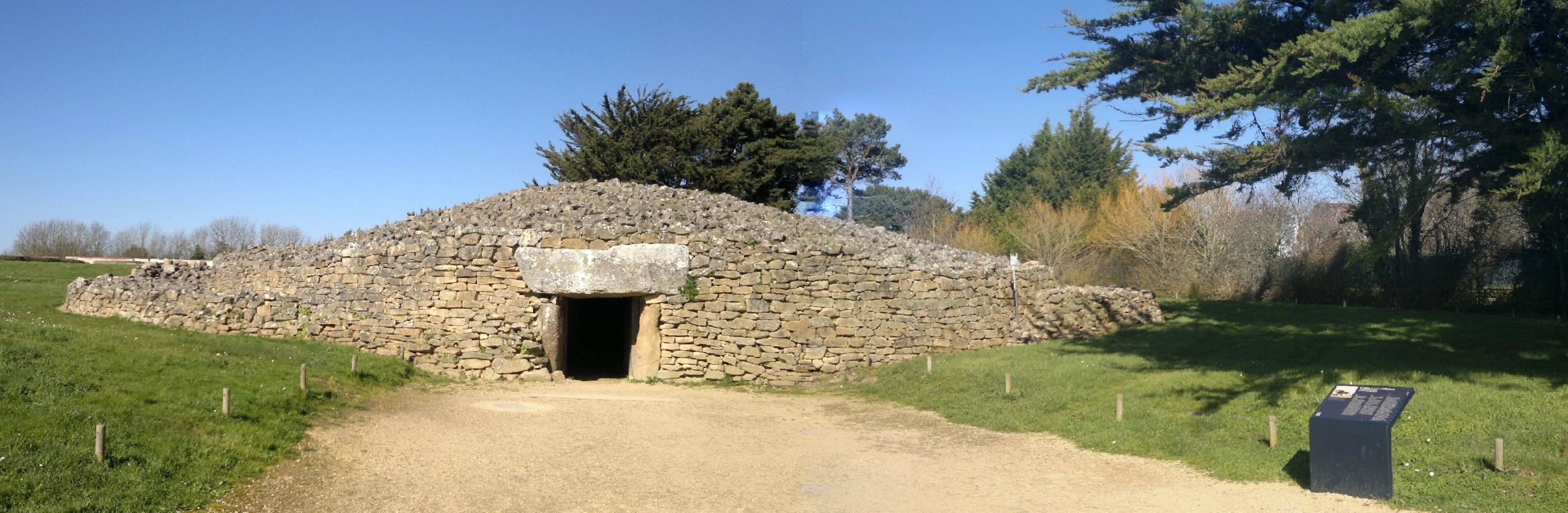 Table des Marchand, Fr-56-Locmariaquer.